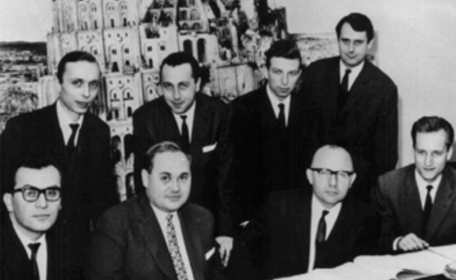 Mailüfterl Team: (v.l.n.r. vorne) Ernst Rothauser, Kurt Bandat, Heinz Zemanek, Norbert Teufelhart (v.l.n.r. hinten) Peter Lucas, Georges Leser, Viktor Kudelka, Kurt Walk